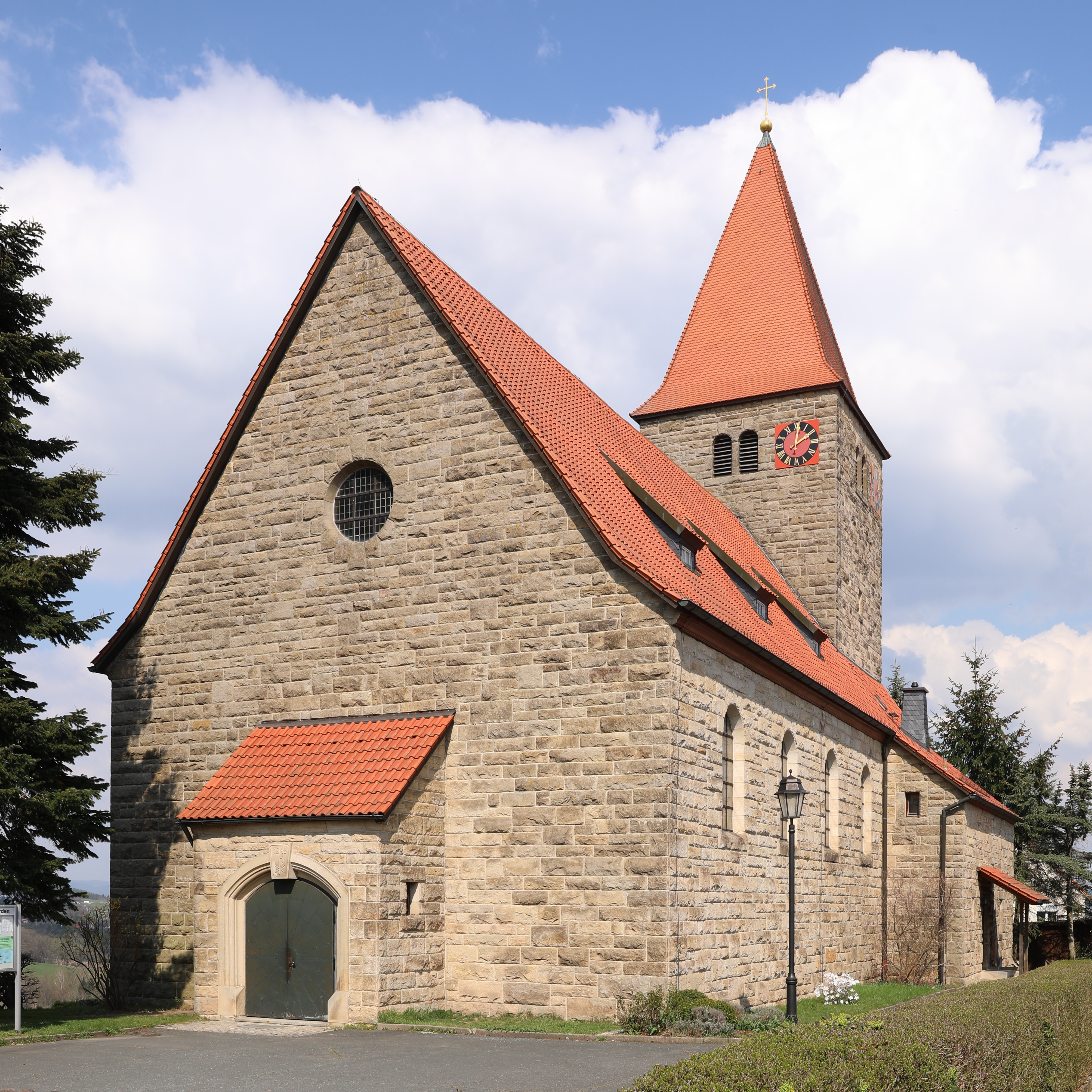 katholische Kirche St. Michael in Ziegelerden